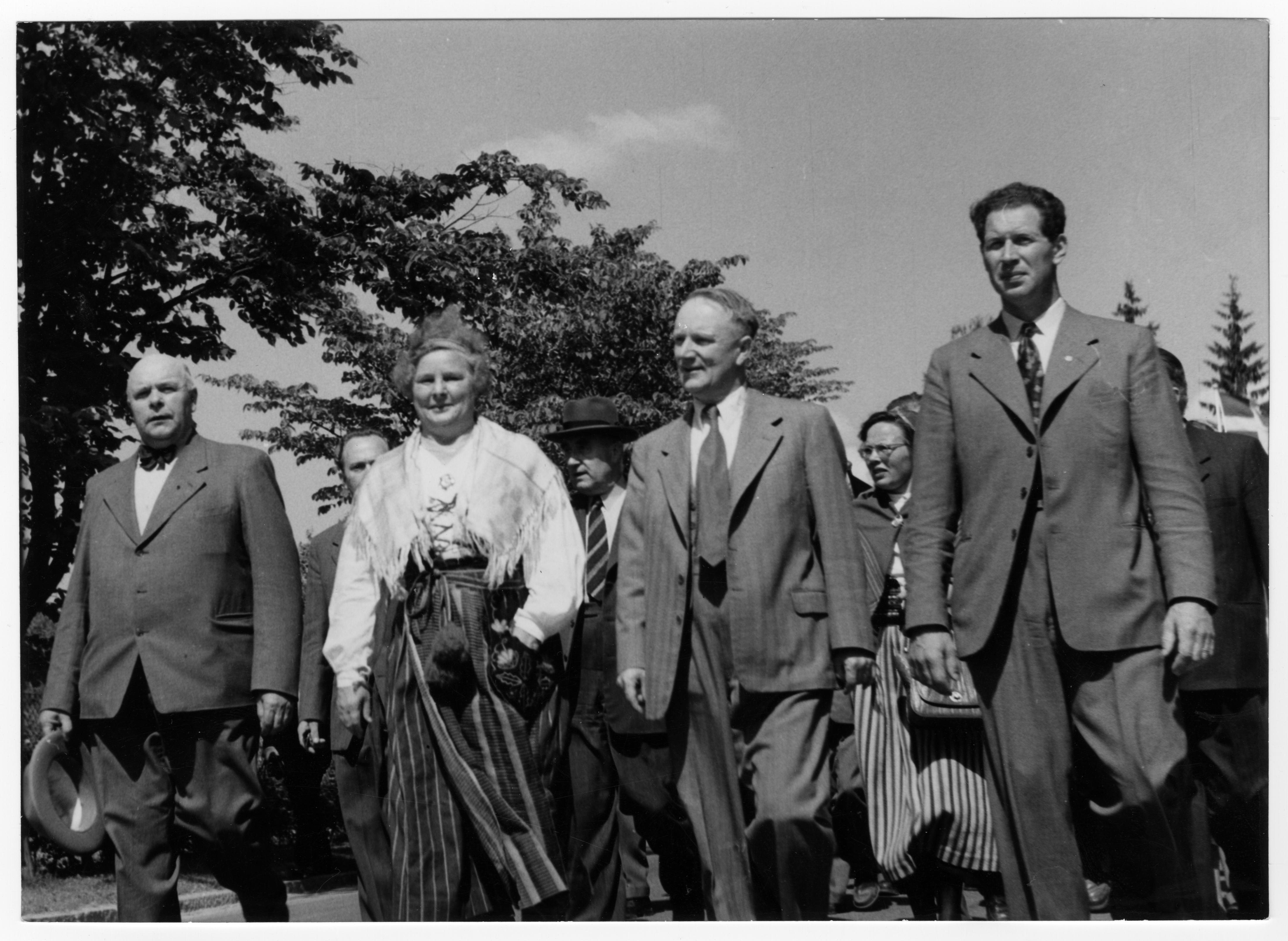 Rikstinget på Djulölandet. Jordbruksminister Sam B Norup, Karin Collin, Gunnar Hedlund och Thorsten Larsson.